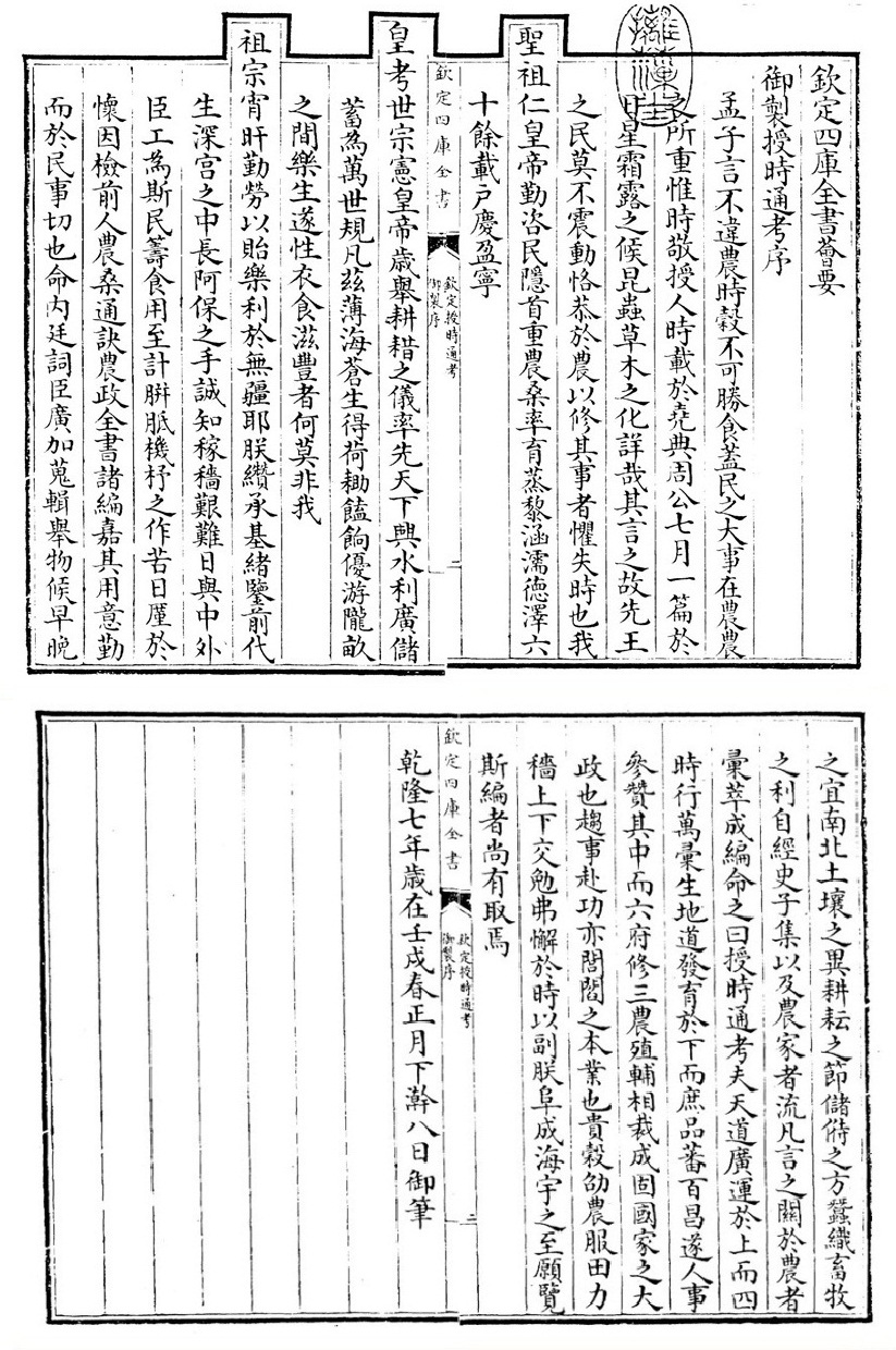 《欽定授時通考》卷首御製序（Qin ding Shou shi tong kao, Preface made by Qianlong Emperor）